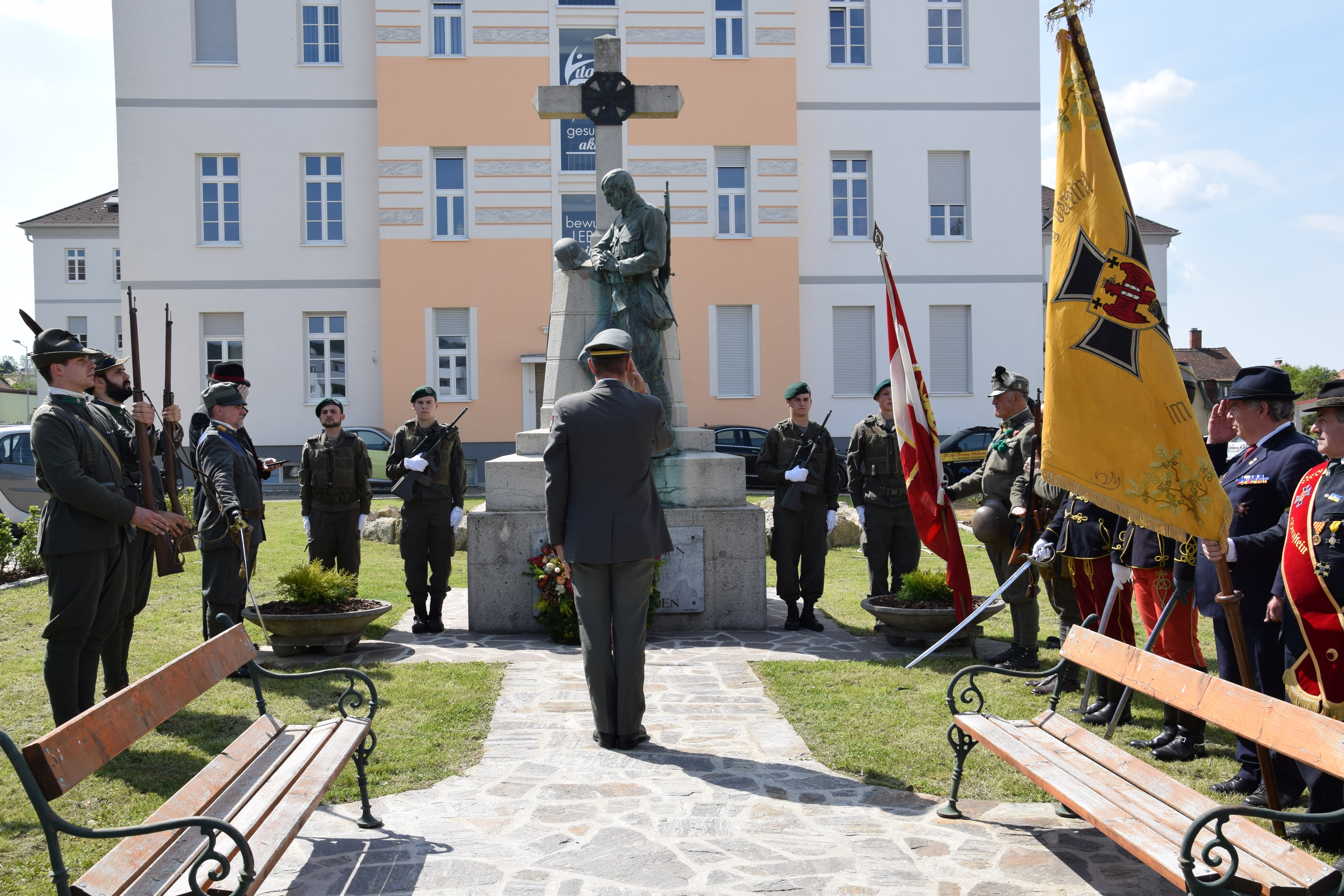 Kranzniederlegung beim Denkmal der k.u.k. Infanterie-Regimenter 83 und 106 in der ehemaligen Turba-Kaserne in Pinkafeld. Oberst Thomas Erkinger - Kommandant des Jäger-Bataillons 19